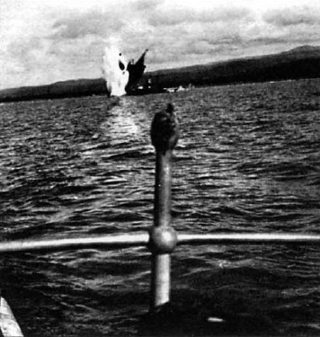 Момент потопления торпедой танспорта «Эдирне» (Edirne). Снимок с мостика ПЛ «Морж».